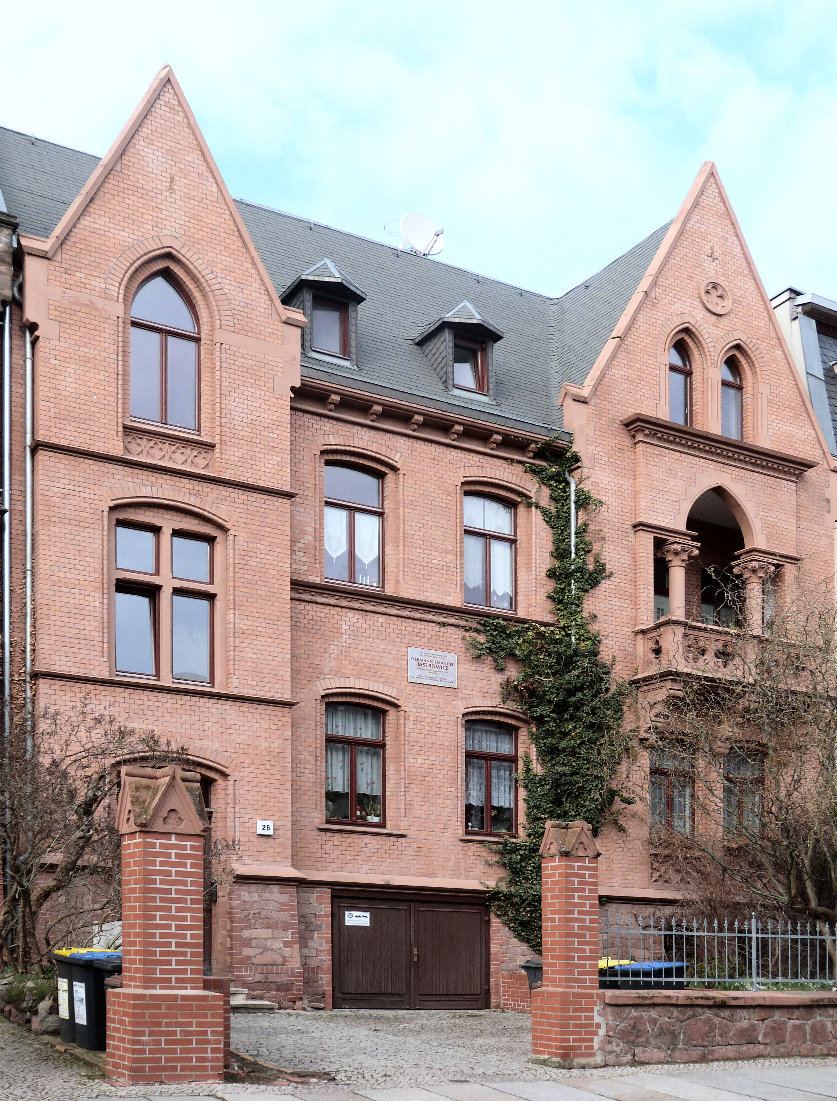 Abbildung Händelstrasse 26